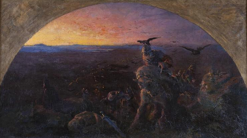 Вечер Богатырства Киевского (эскиз фрески на тему былины). Xолст, масло. 78 х 138 см. По книге: Николай Рерих в русской периодике, 1891–1918. Вып. 1: 1891–1901/— СПб.: Фирма Коста, 2004. 5. стр.41. (Всемирная иллюстрация. 1897. Том 58. 19 июля. № 4. С. 81, 84. Эскиз — с. 75) приведено такое название картины: "Русский богатырский эпос. Как перевелись богатыри на Руси."